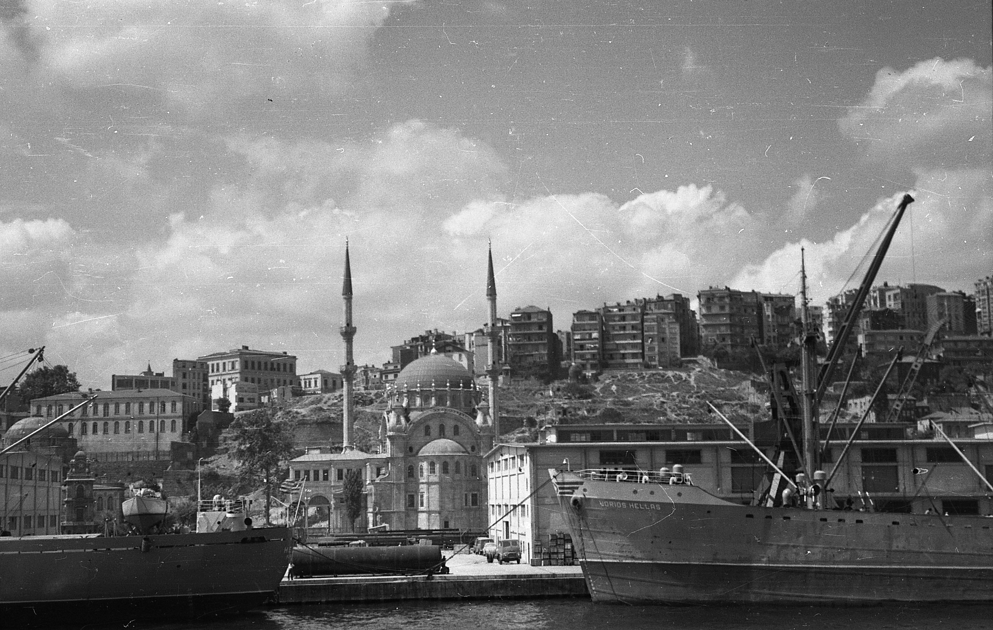 Tophane városrész, Nusretiye mecset. Location: Turkey, Istambul Tags: mosque Title: Tophane városrész, Nusretiye mecset.